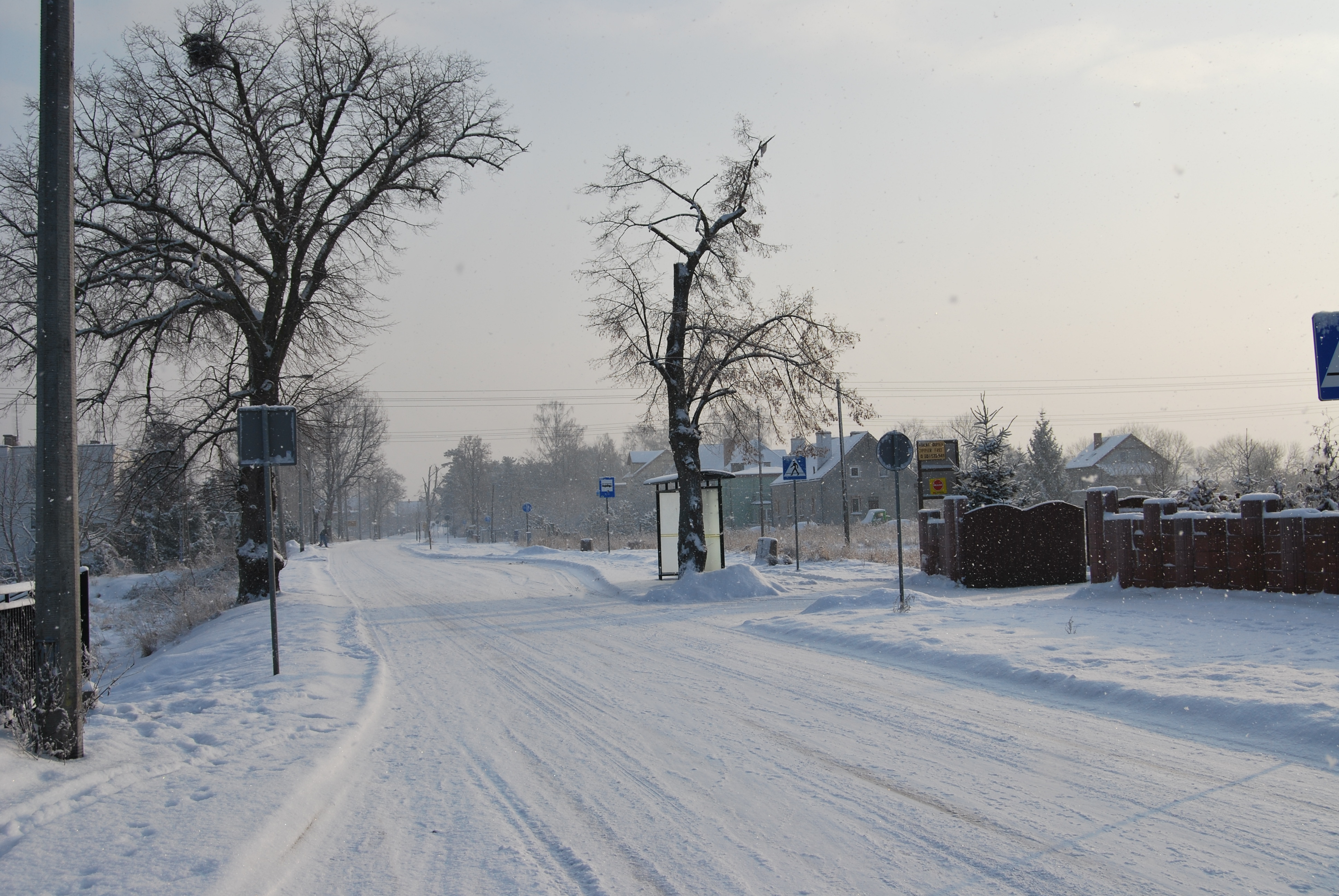 Świbno; 2010 r.